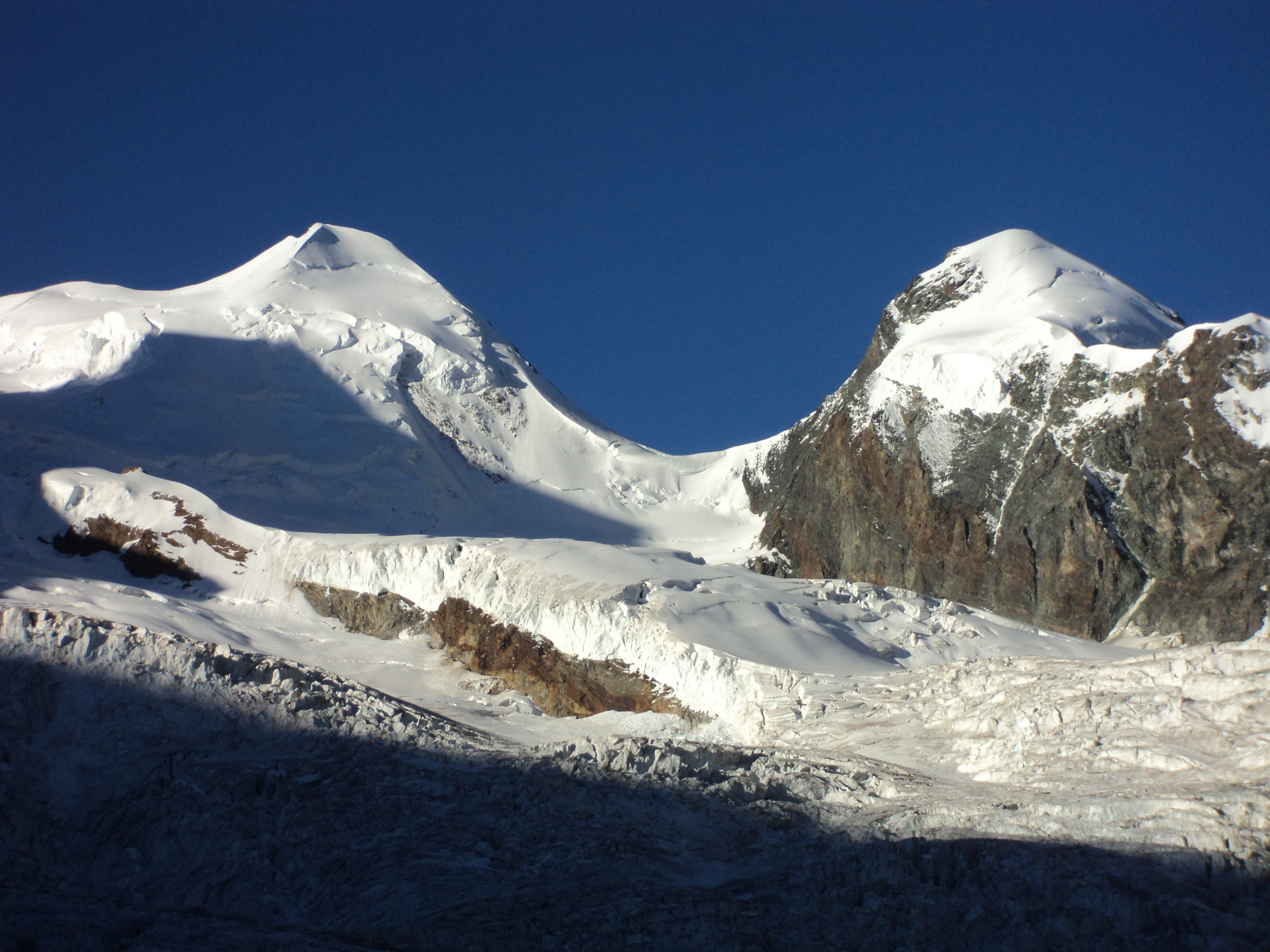 Il Castore (a sinistra) ed il Pollice (a destra) dal versante svizzero al mattino. Massiccio del Monte Rosa.